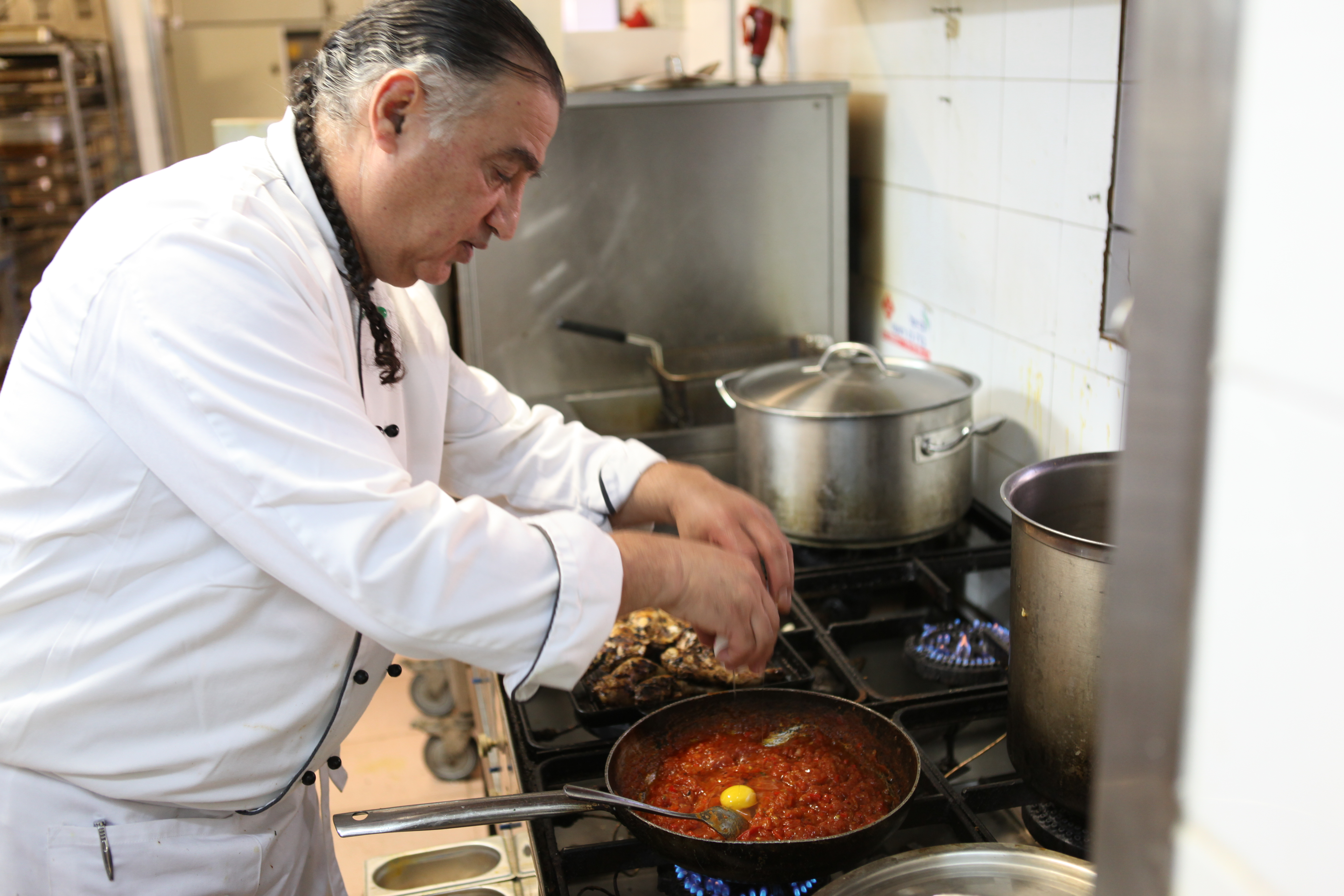 Restaurant (Ecaliptus) Jerusalem